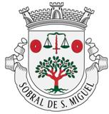 Brasão do Sobral de São Miguel